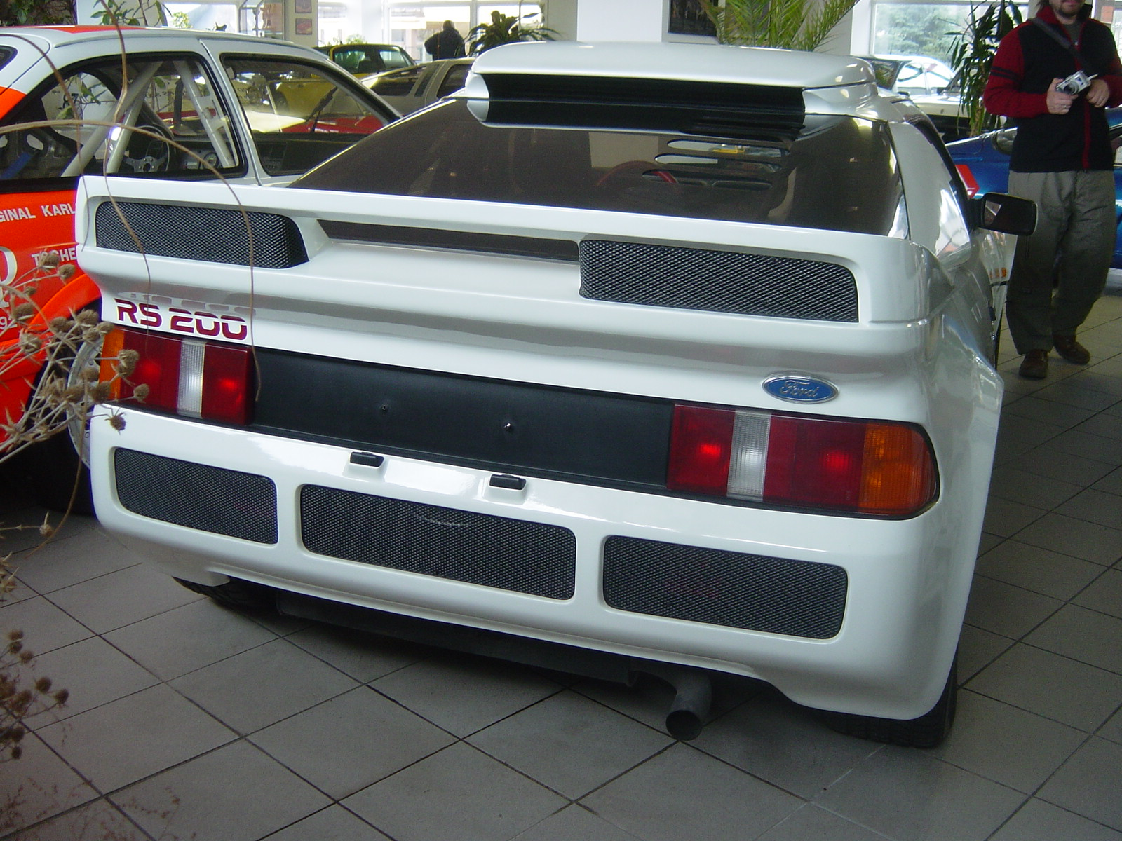 Ford RS 200